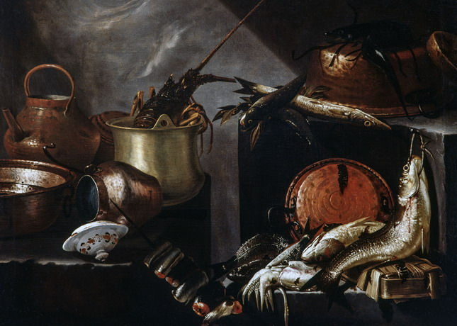 Натюрморт. «Риби, мідний посуд і моллюски» роботи Джованні Баттіста Рекко